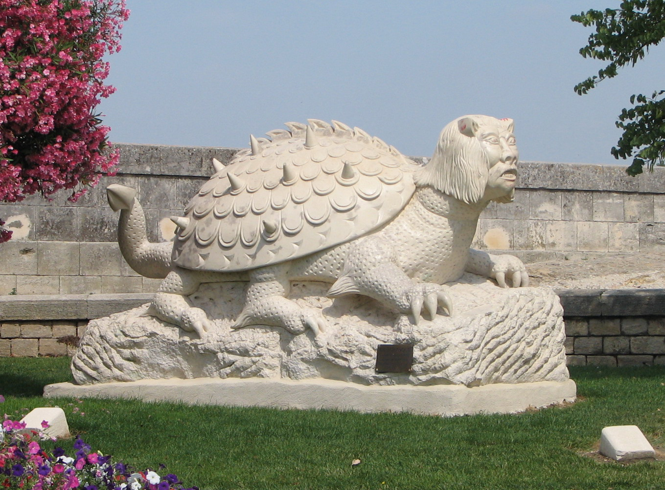 La statue de la tarasque à Tarascon